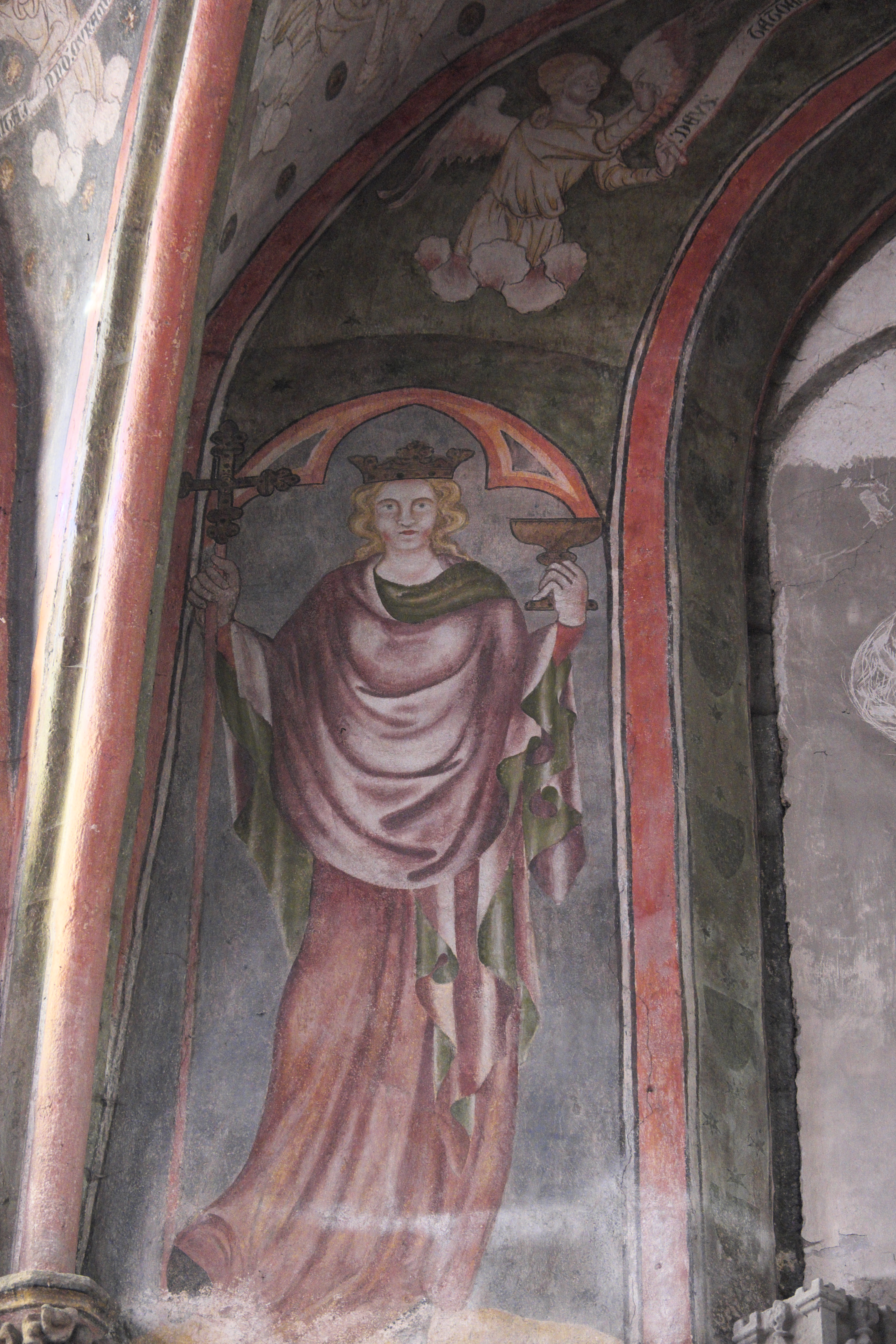 Katholische Pfarrkirche, ehemalige Stiftskirche, Saint-Cerneuf in Billom im Département Puy-de-Dôme (Auvergne-Rhône-Alpes), Chapelle du Rosaire, Wandmalerei aus dem 14. Jahrhundert